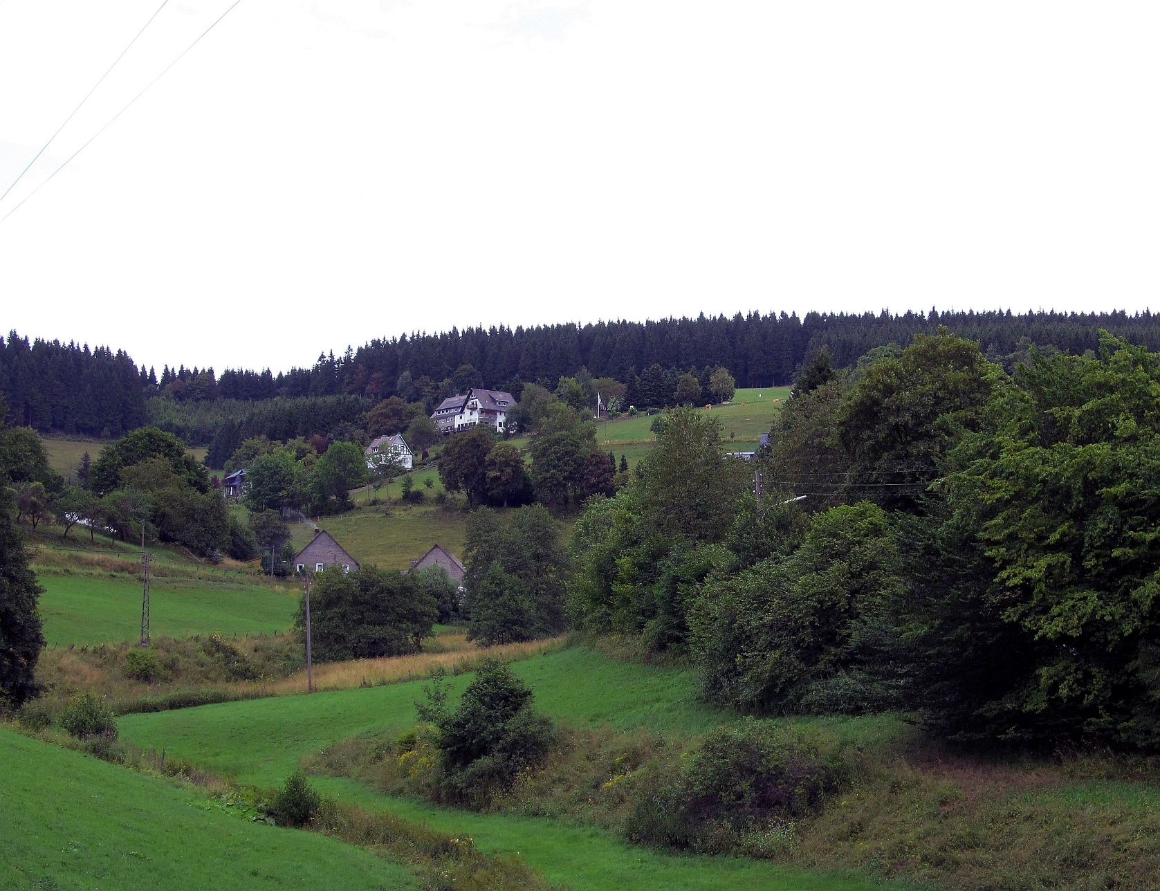 Schmallenberg-Nesselbach (Germany)